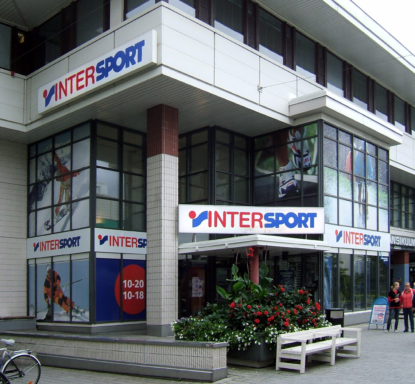 Intersportin liike Espoon Tapiolassa.